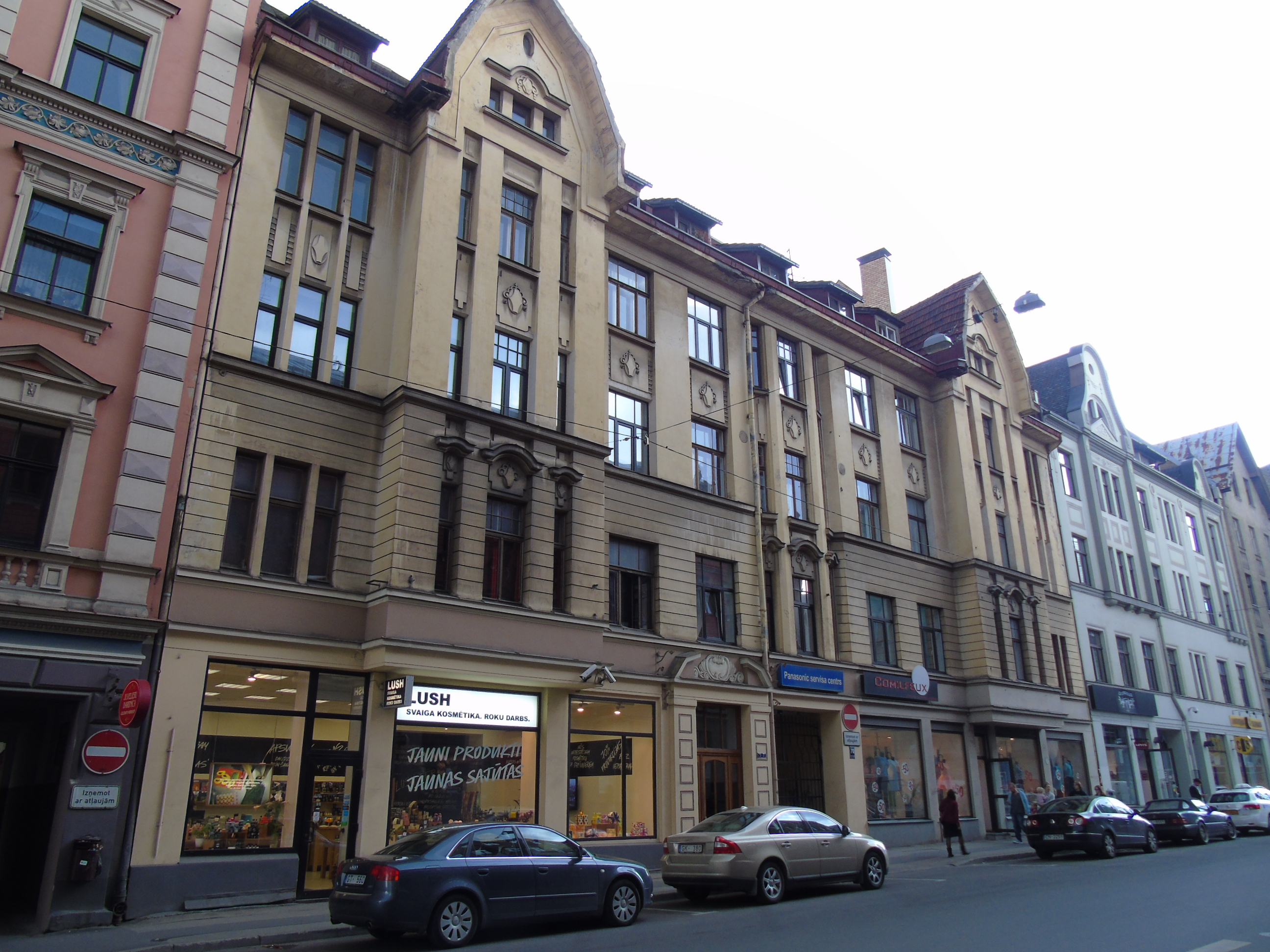 Dzīvojamā ēka, Rīga, Dzirnavu iela 70